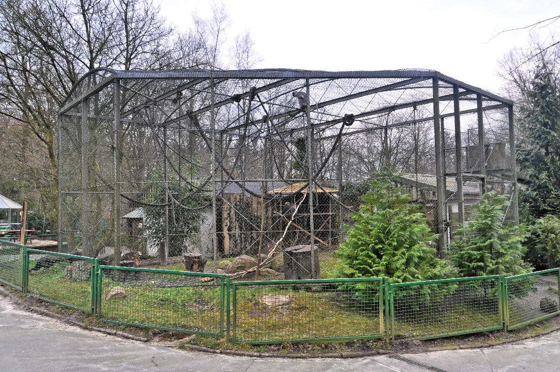 Zoo in der Wingst 2014